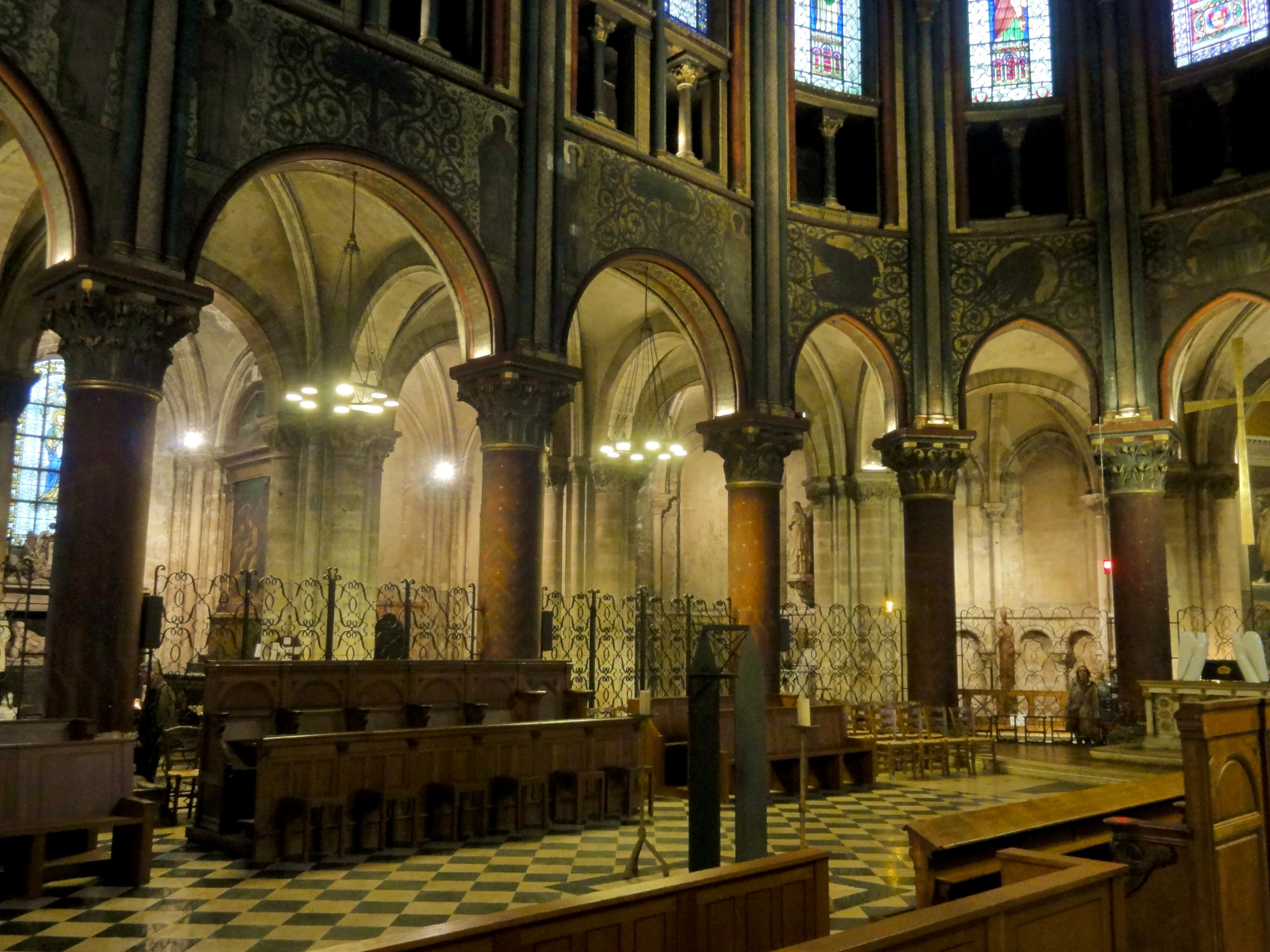 Chœur, côté nord.